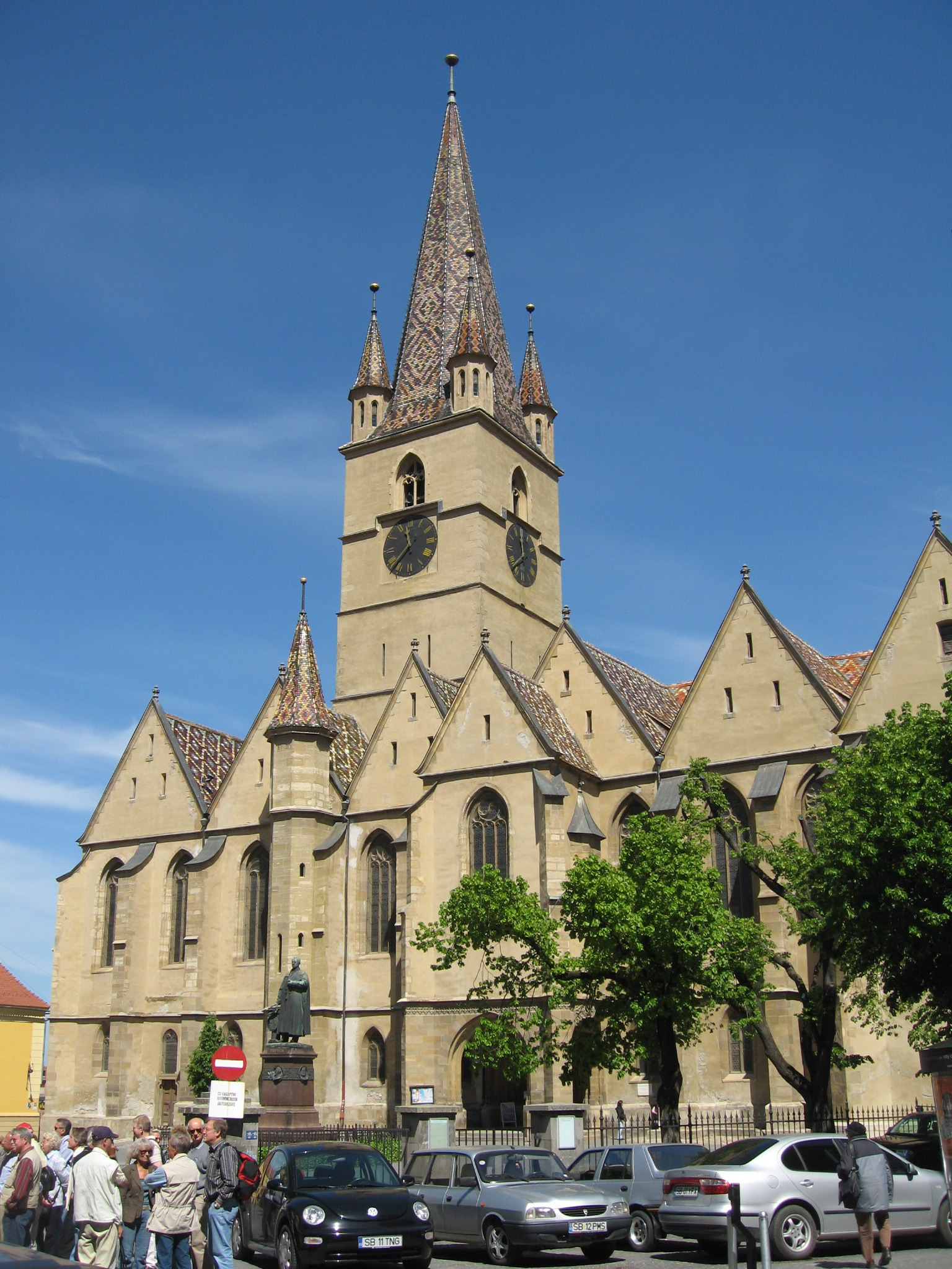 Catedrala evanghelică din Sibiu